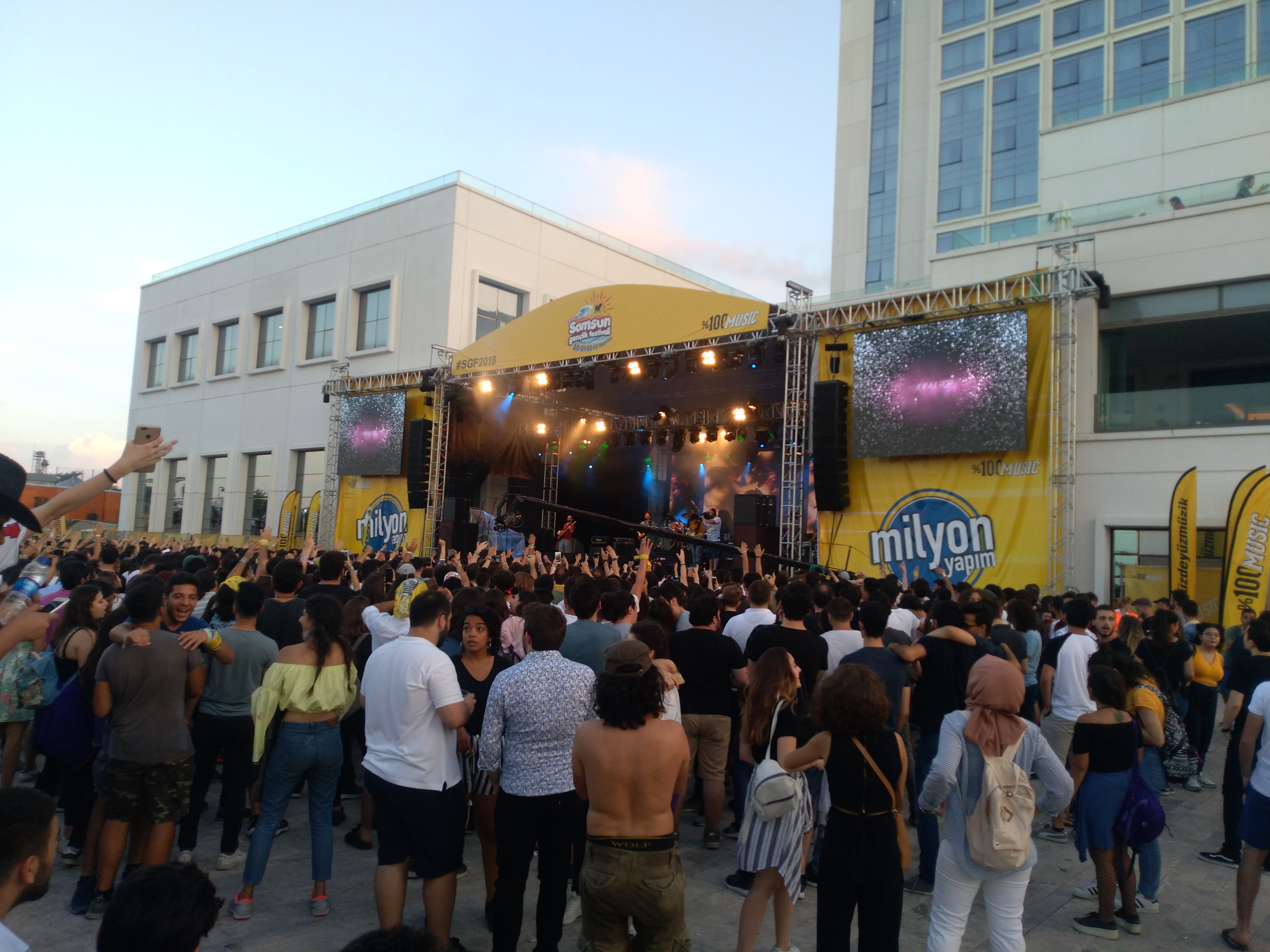 2018 Samsun Gençlik Festivali'nde Pinhani sahne alırken çekilmiş bir fotoğraf.